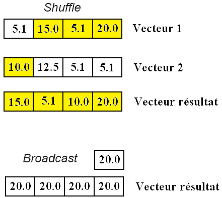 Exemple d'execution d'une instruction vectorielle d'addition